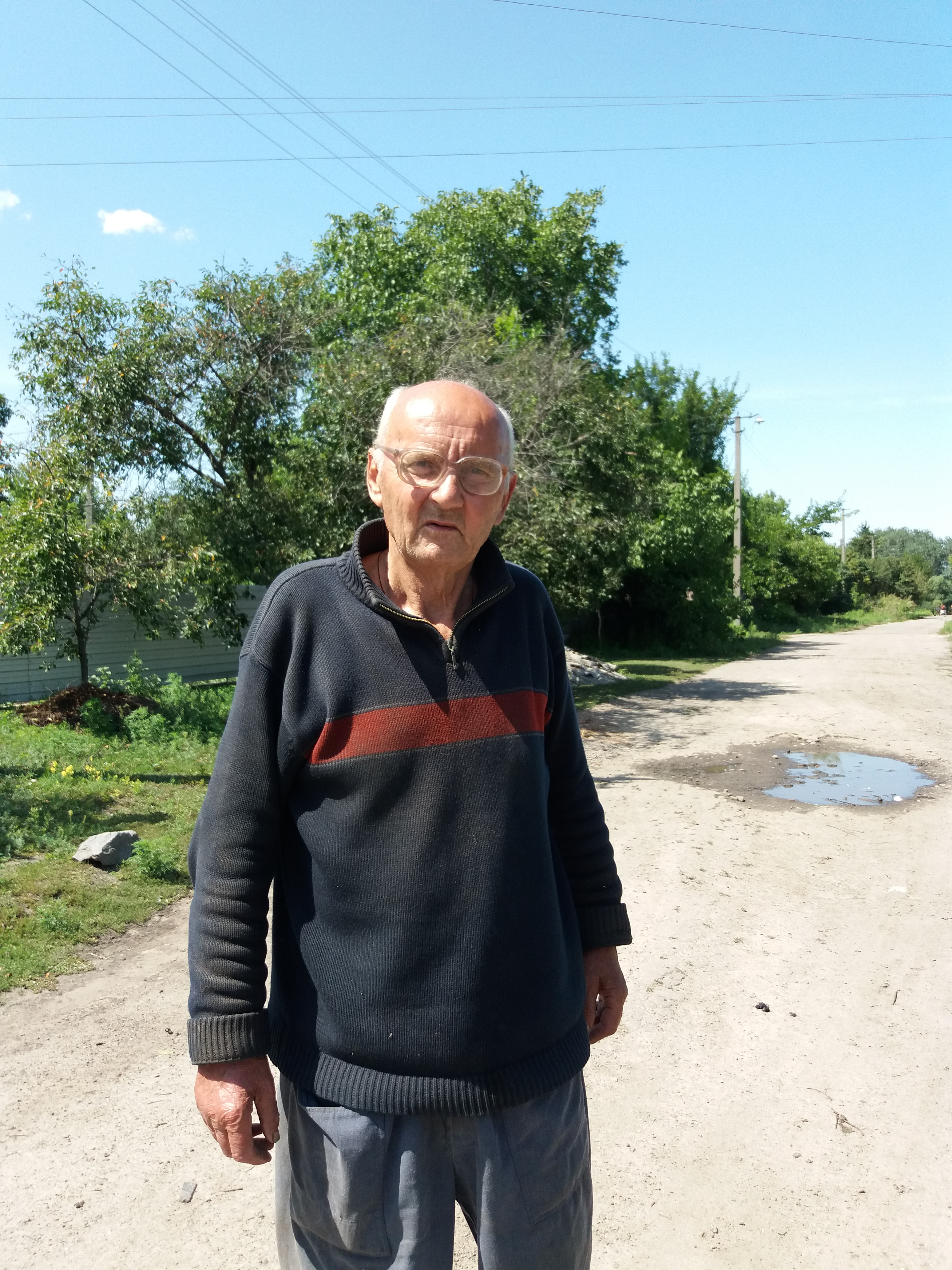 Олександр Іванович Руденко – депутат Павлиської селищної ради